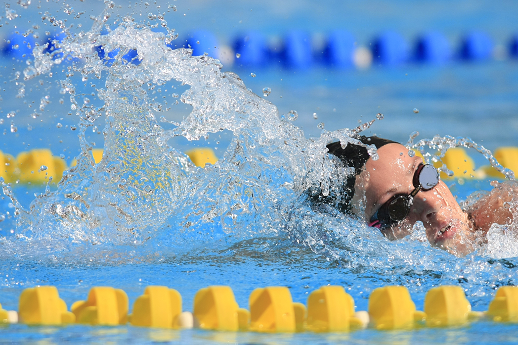 Kristel Kobrich durante a prova dos 1500 metros livres, realizada no Parque Aquatico Maria Lenk. A nadadora venceu a prova com o tempo de 16'11"40, estabelecendo novo record Sul-Americano.